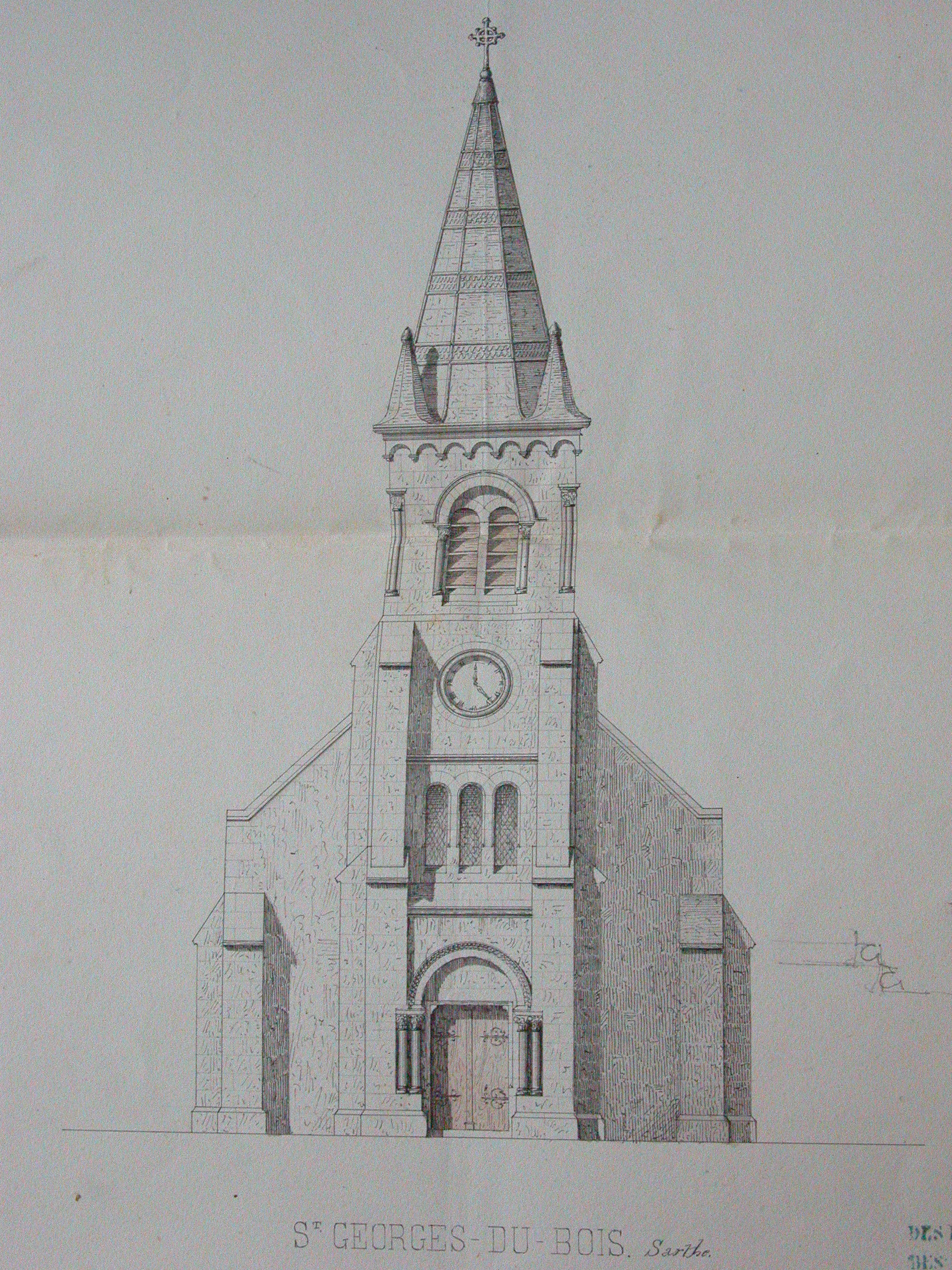 Projet de façade non retenu de l'église de Saint-Georges-du-Bois dans le département français de la Sarthe, en 1855.